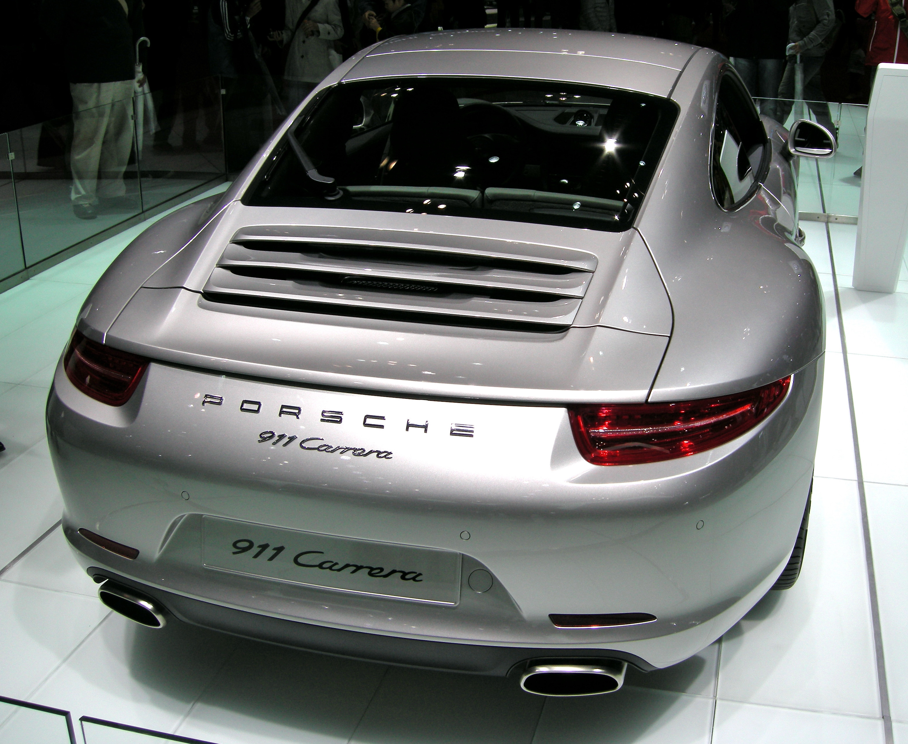 東京モーターショーにて撮影